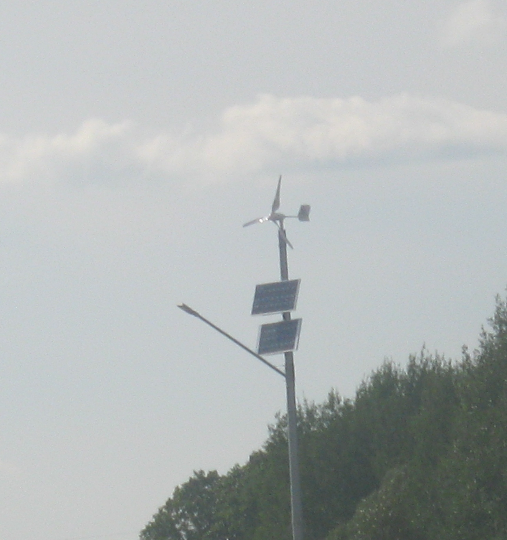 Solar and Wind Energy near to Alytus, Lithuania